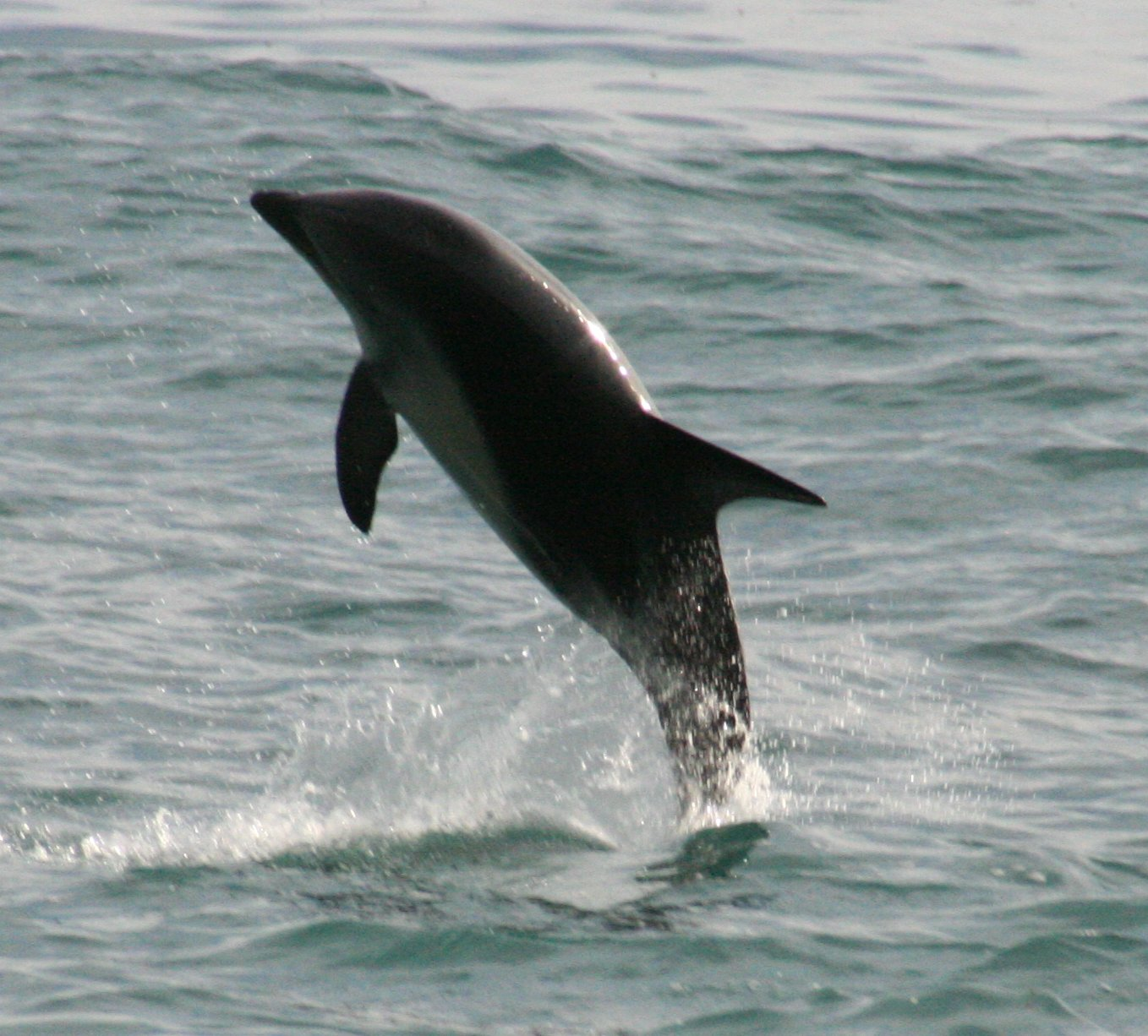 Dusky Dolphin, Kaikoura